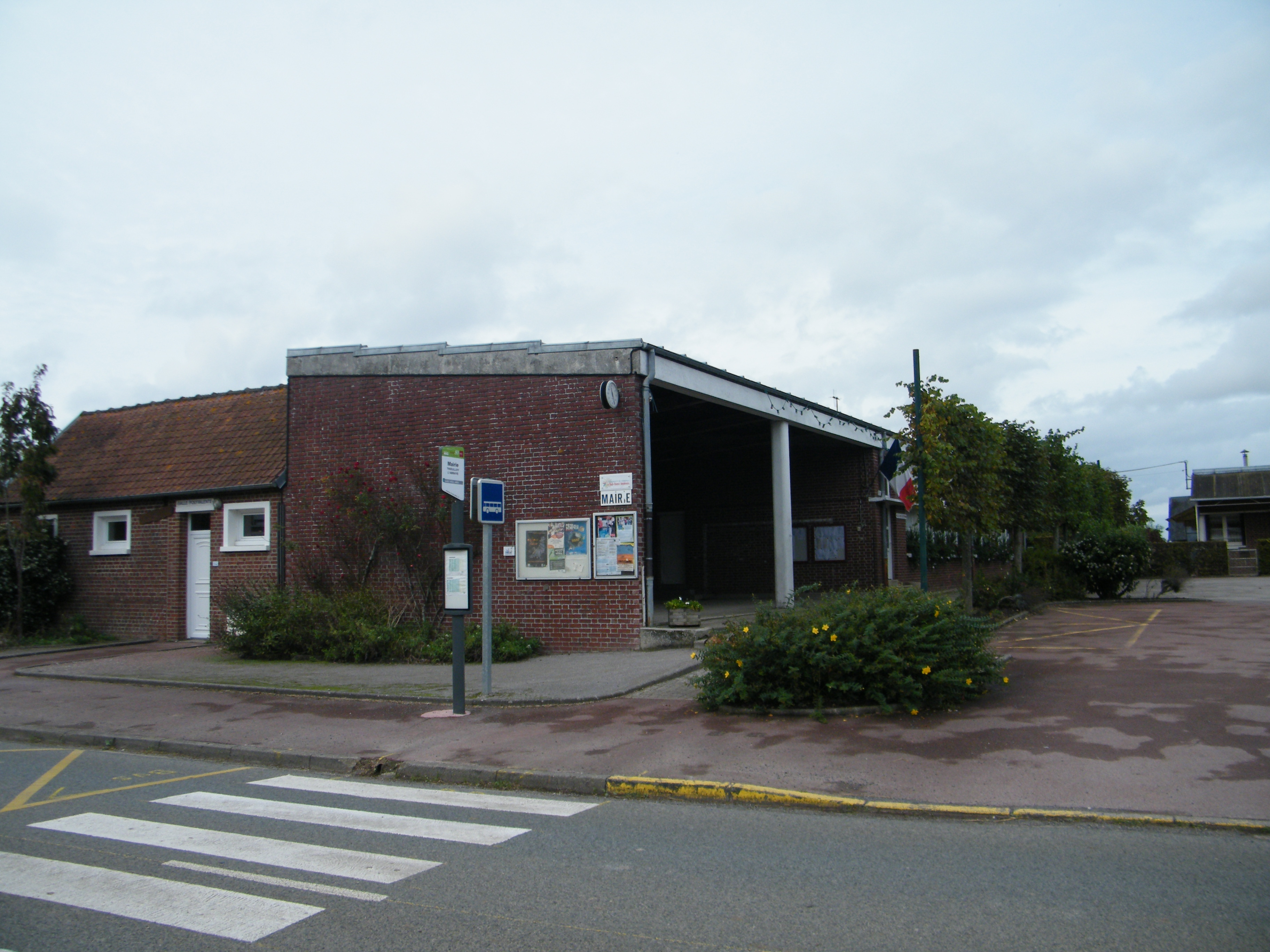 Mairie-école.